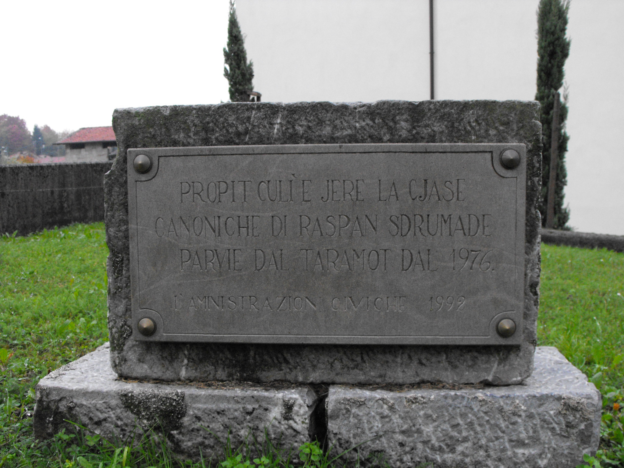 Targa commemorativa della canonica di Raspano, frazione del comune di Cassacco, provincia di Udine in Friuli-Venezia Giulia - Italia